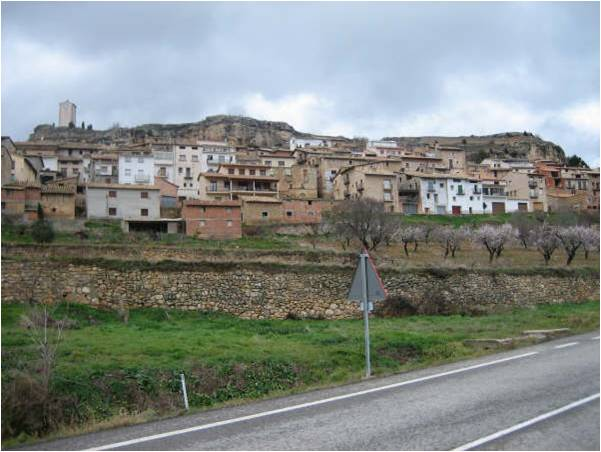 Vista de la población de Monroyo.